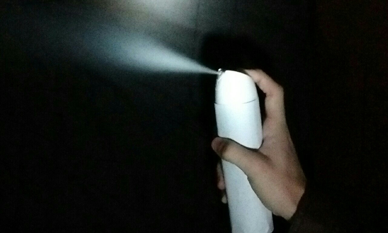 Desodorante sendo usado